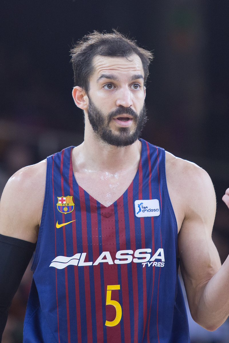 Pau Ribas, jugador del Barça, en un partido de la temporada 2017-18